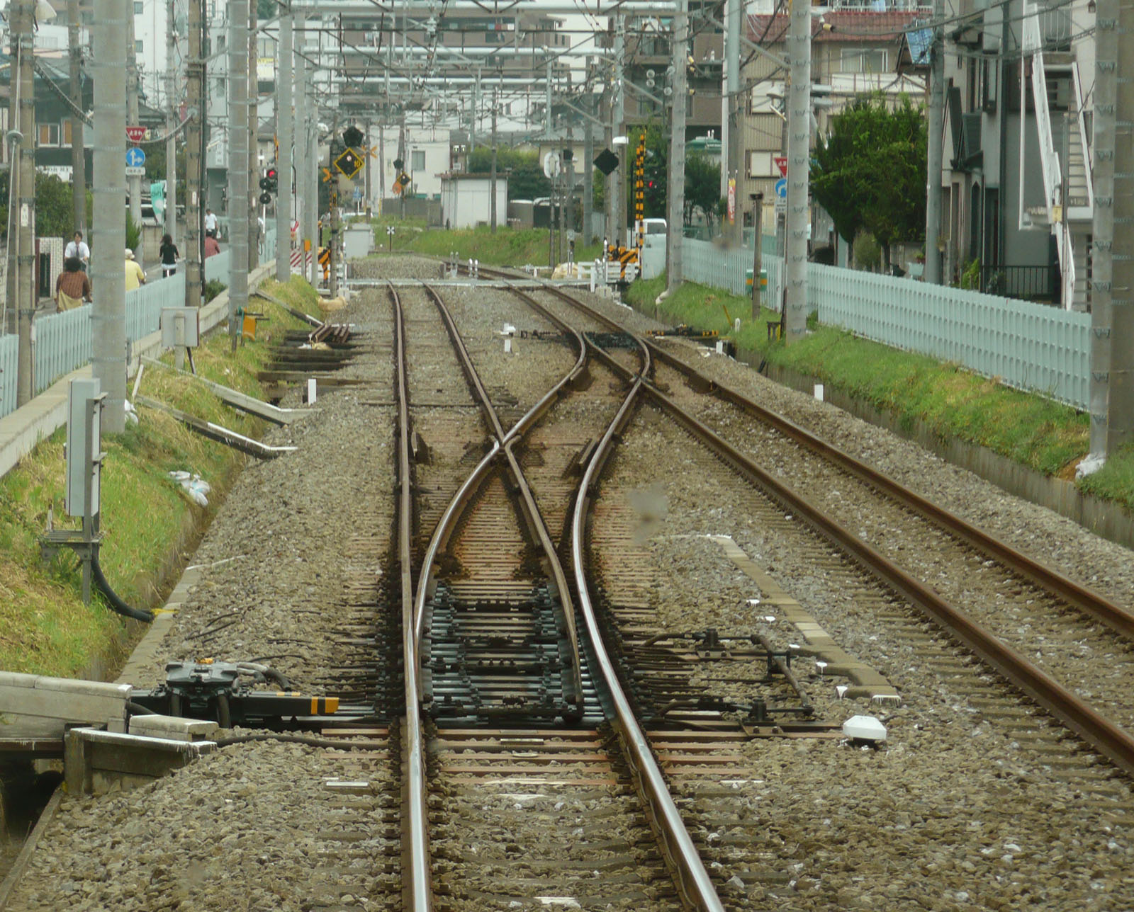 脇田信号所